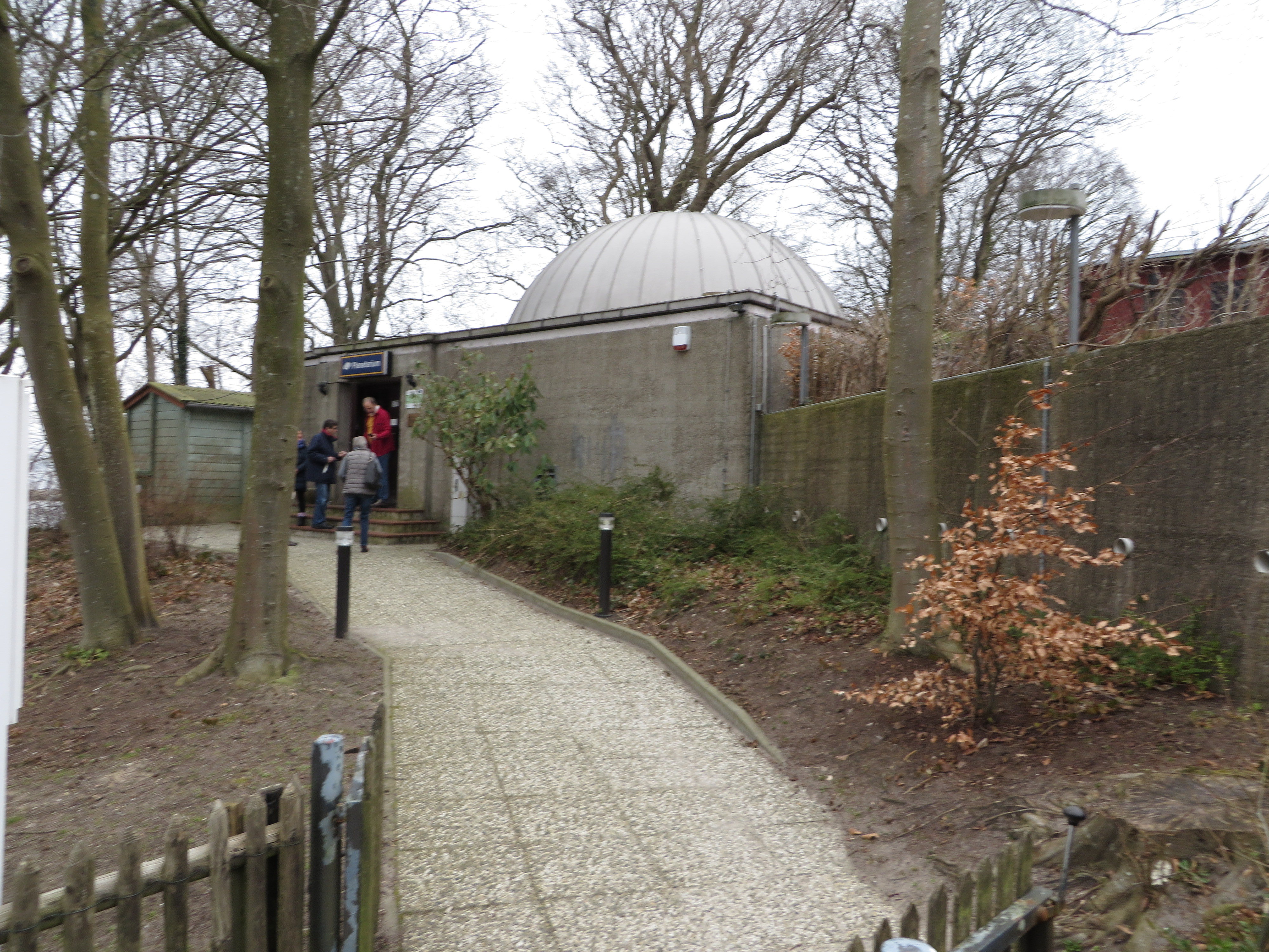 Menke-Planetarium (Glücksburg 2015), Bild 01